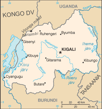 Rwanda kaart